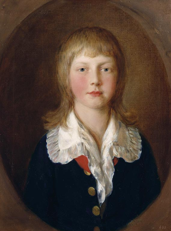 Prince Ernest I de Hanovre, à 11 ans